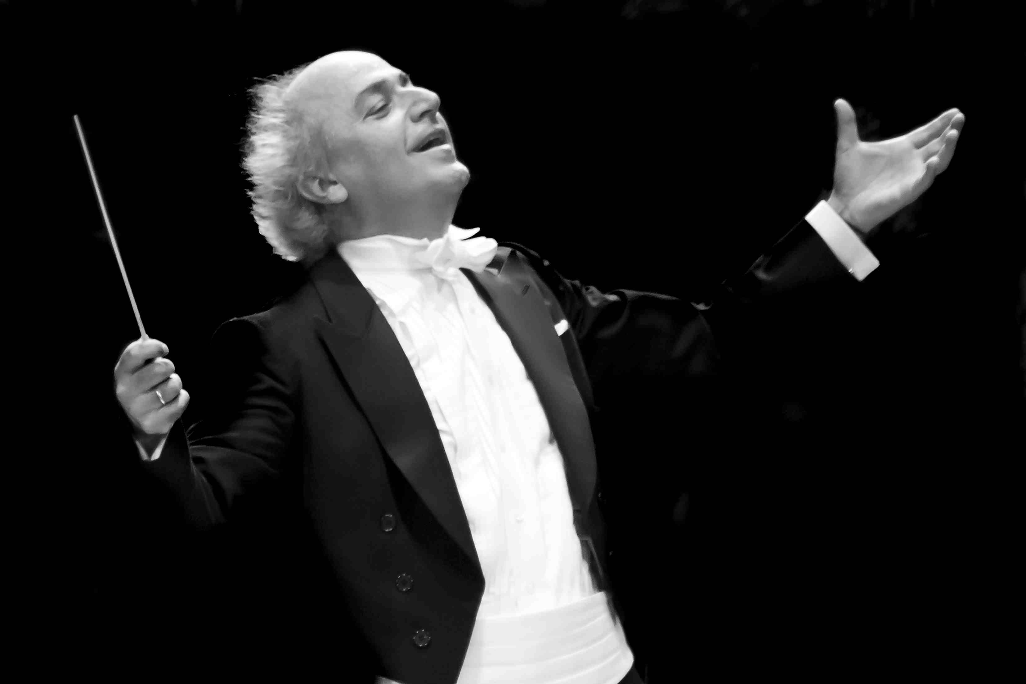 Eduardo Marturet. Dirigiendo.